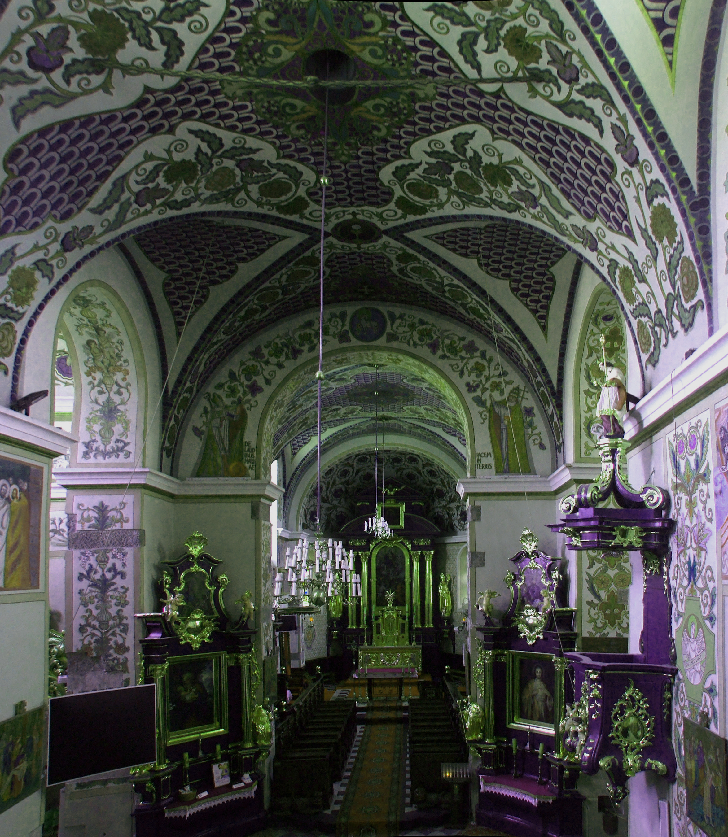 Klasztor cystersów w Szczyrzycu. Kościół